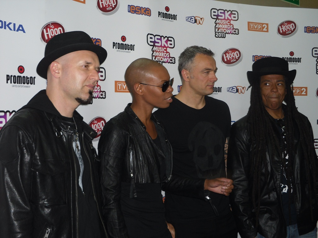 Zdjęcie zrobione podczas Eska Music Awards 2011 w katowickim Spodku. Photo of Skunk Anansie taken during Eska Music Awards 2011 in Katowice